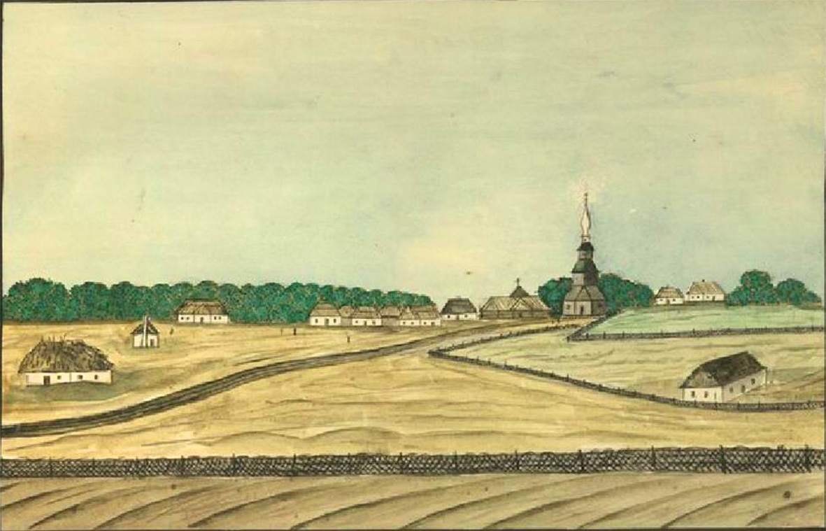 Біличі. Домінік П'єр де ля Фліз. «Медико-топографічний опис державних маєтностей Київської округи з зображенням деяких природних витворів рослинного і тваринного світу, разом із статистикою кожного села, їхнім виглядом, зробленим з натури, зображенням селянських костюмів та географічною картою Київської округи». Київ, 1854. - С. 752.